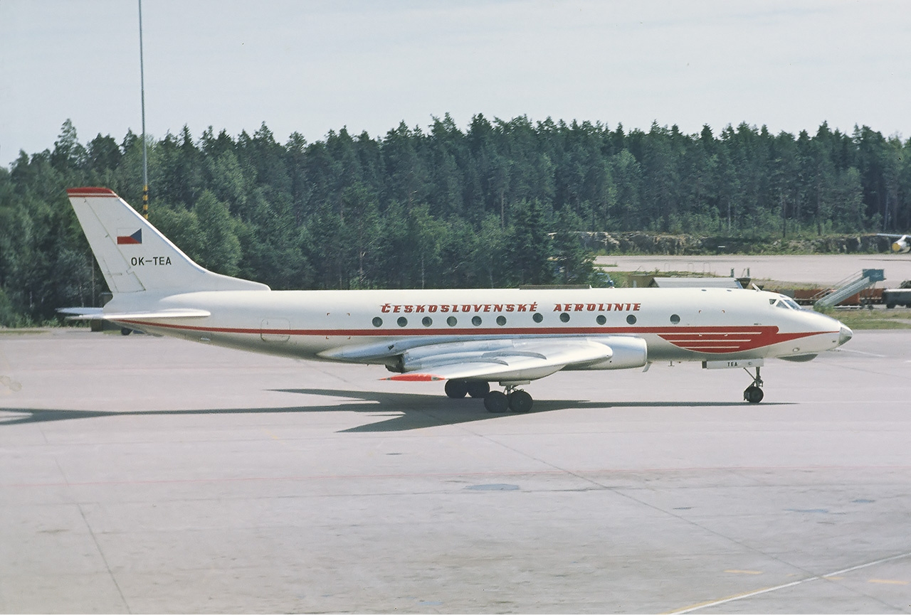 CSA Tupolev Tu-124V